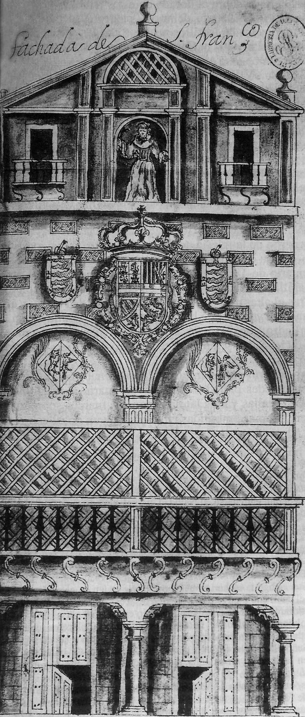 Portada del convento de San Francisco en Valladolid (patrimonio perdido). Dibujo realizado por Ventura Pérez para ilustrar la Historia de Valladolid de Antolínez de Burgos. Siglo XVIII.